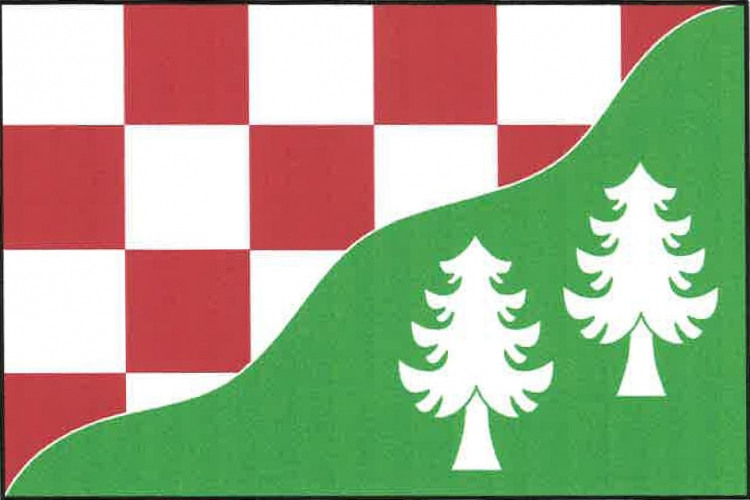 vlajka, Rapšach, okres Jindřichův Hradec